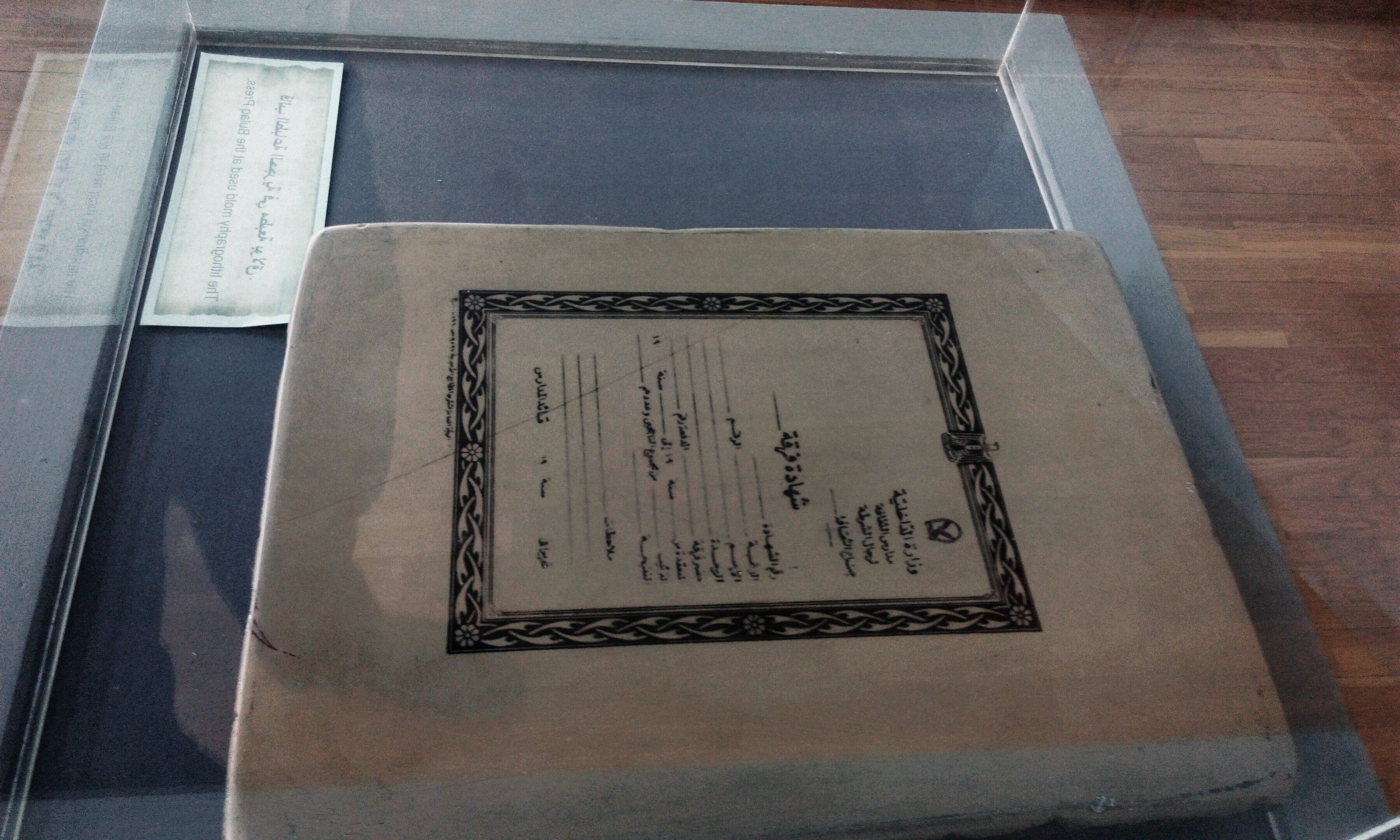 قالب الطباعة الحجرية في مطبعة البولاق، القالب موجود حالياً في مكتبة الإسكندرية